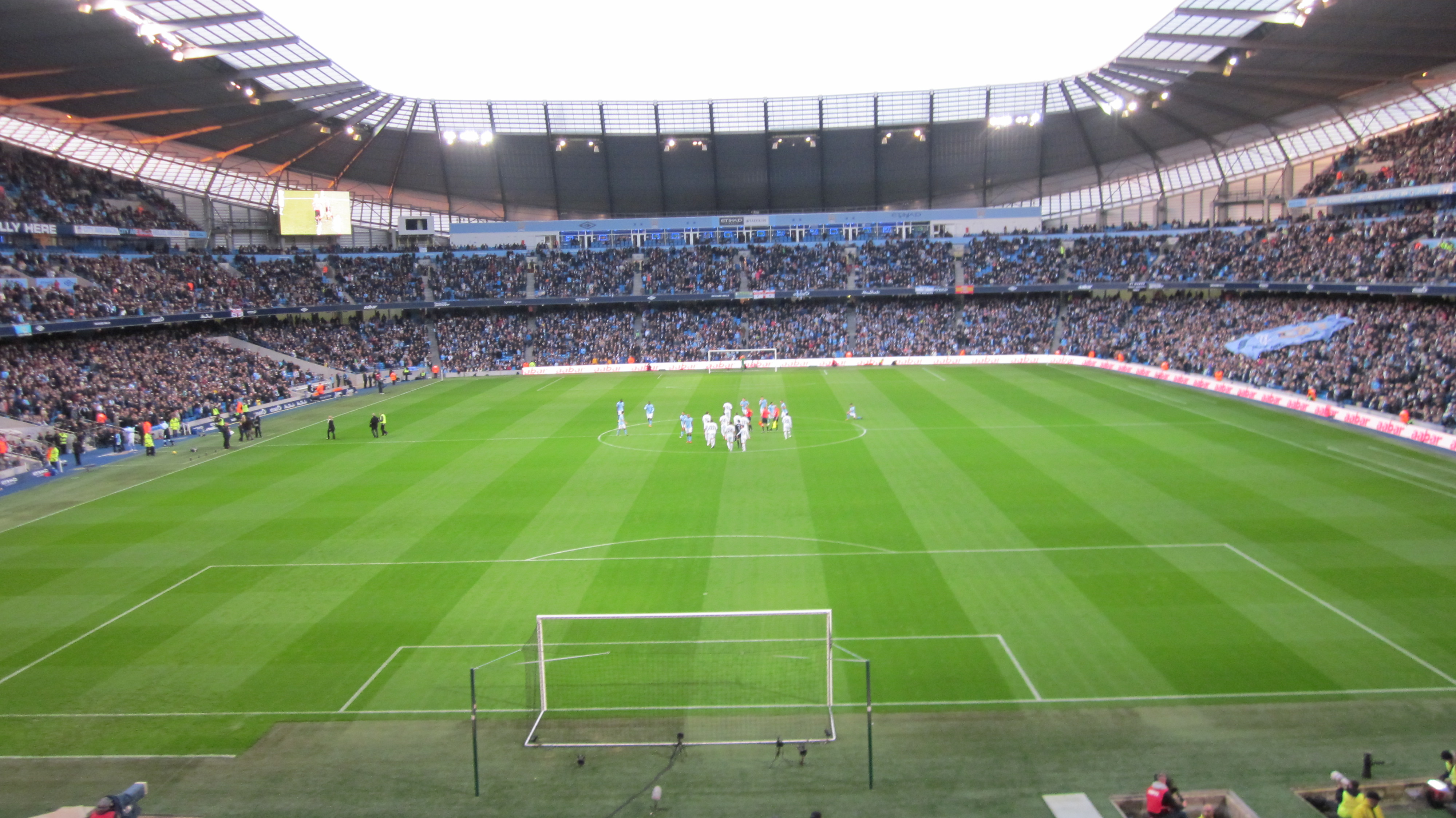 Photo de l'Etihad Stadium avant le coup d'envoie du match Manchester City - Swansea City, 27 octobre 2012